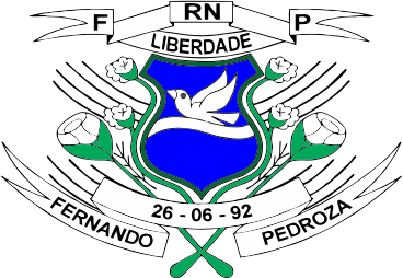 Brasão